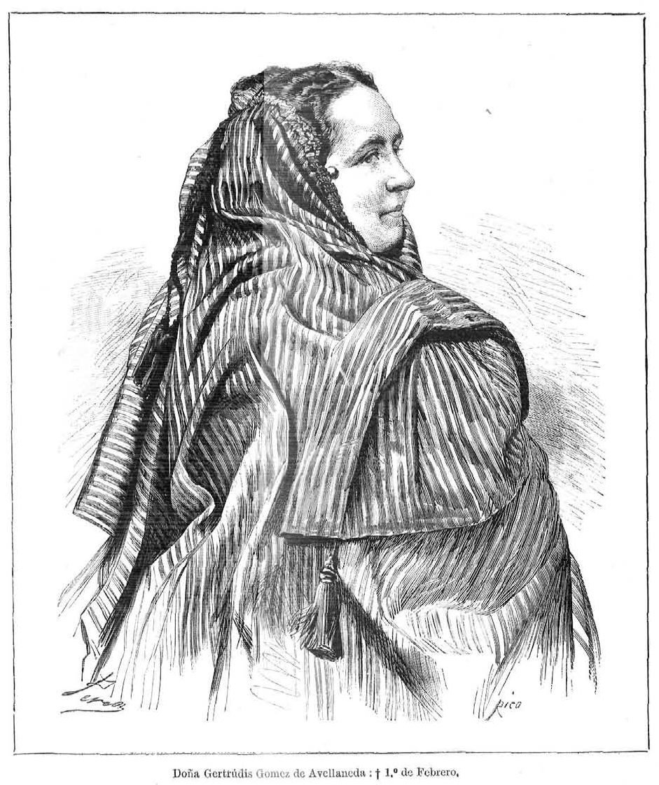 Doña Gertrudis Gómez de Avellaneda, en la revista española La Ilustración Española y Americana.